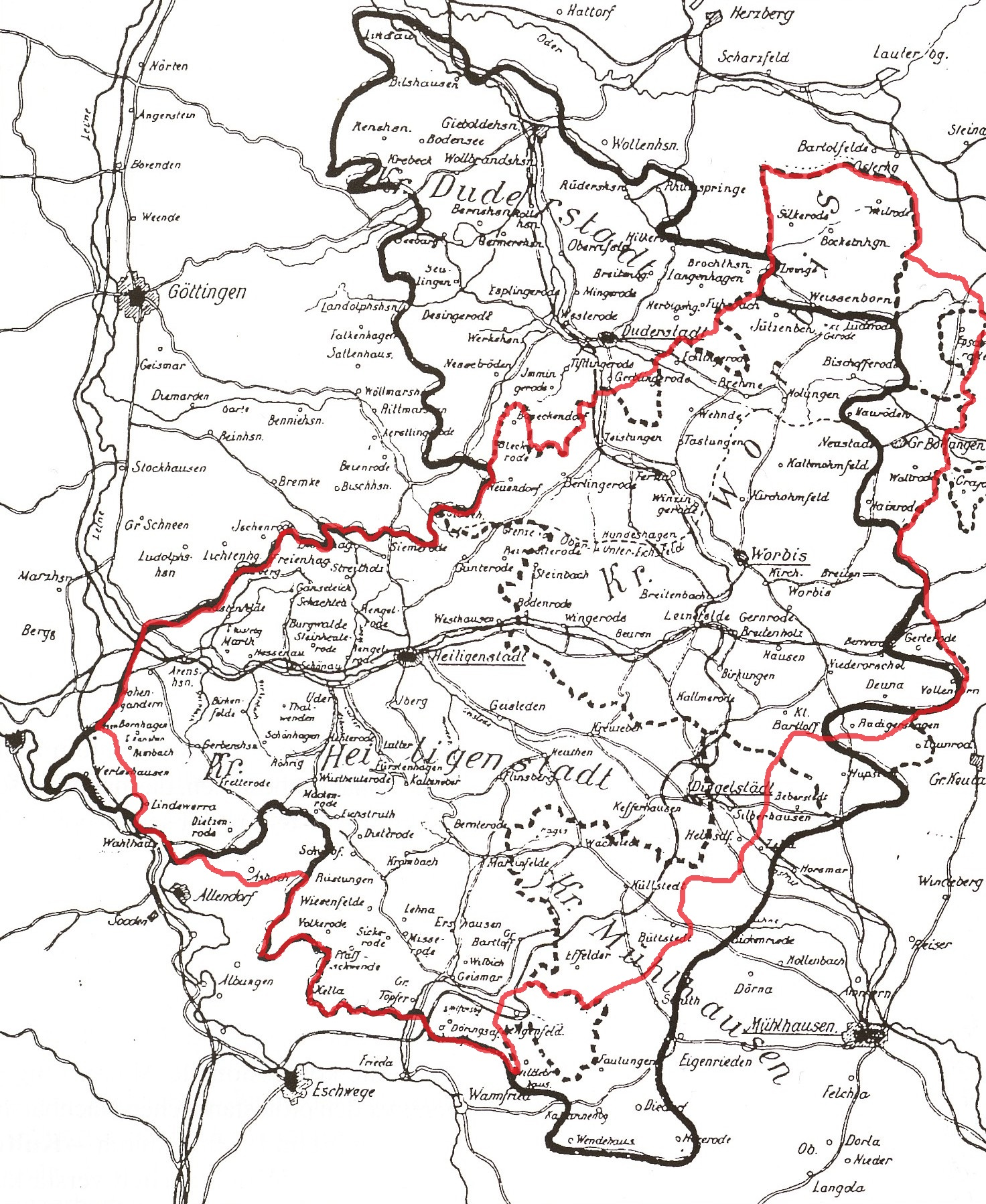 Das Eichsfeld 1900: Der Landkreis Eichsfeld ab 1994